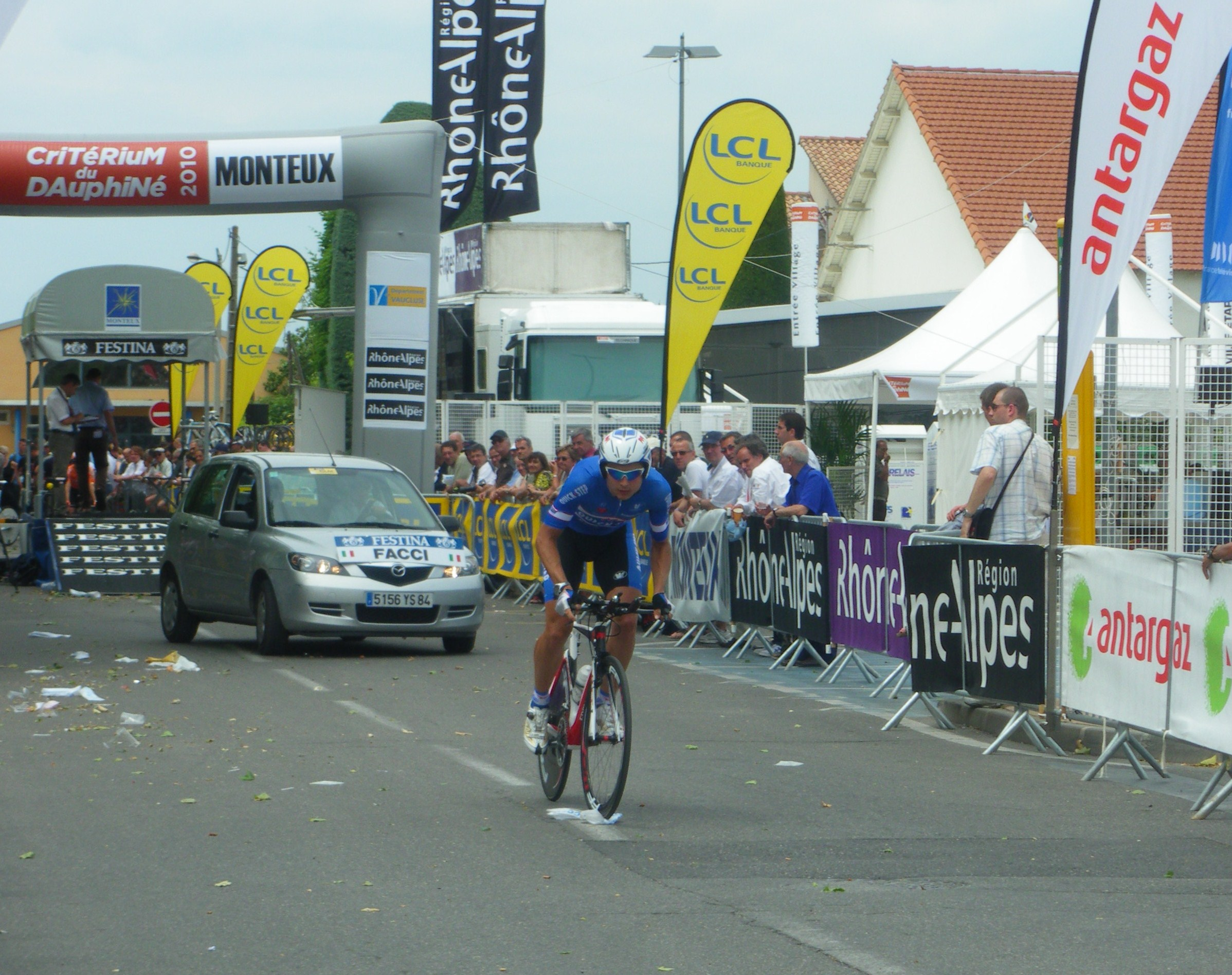 Mauro Facci au départ de la 3ème étape du Critérium du Dauphiné Libéré 2010 (Monteux - Sorgues)